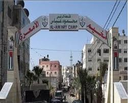 صورة مخيم الامعري